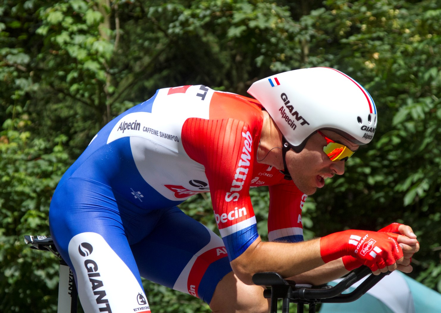 426 dumoulin